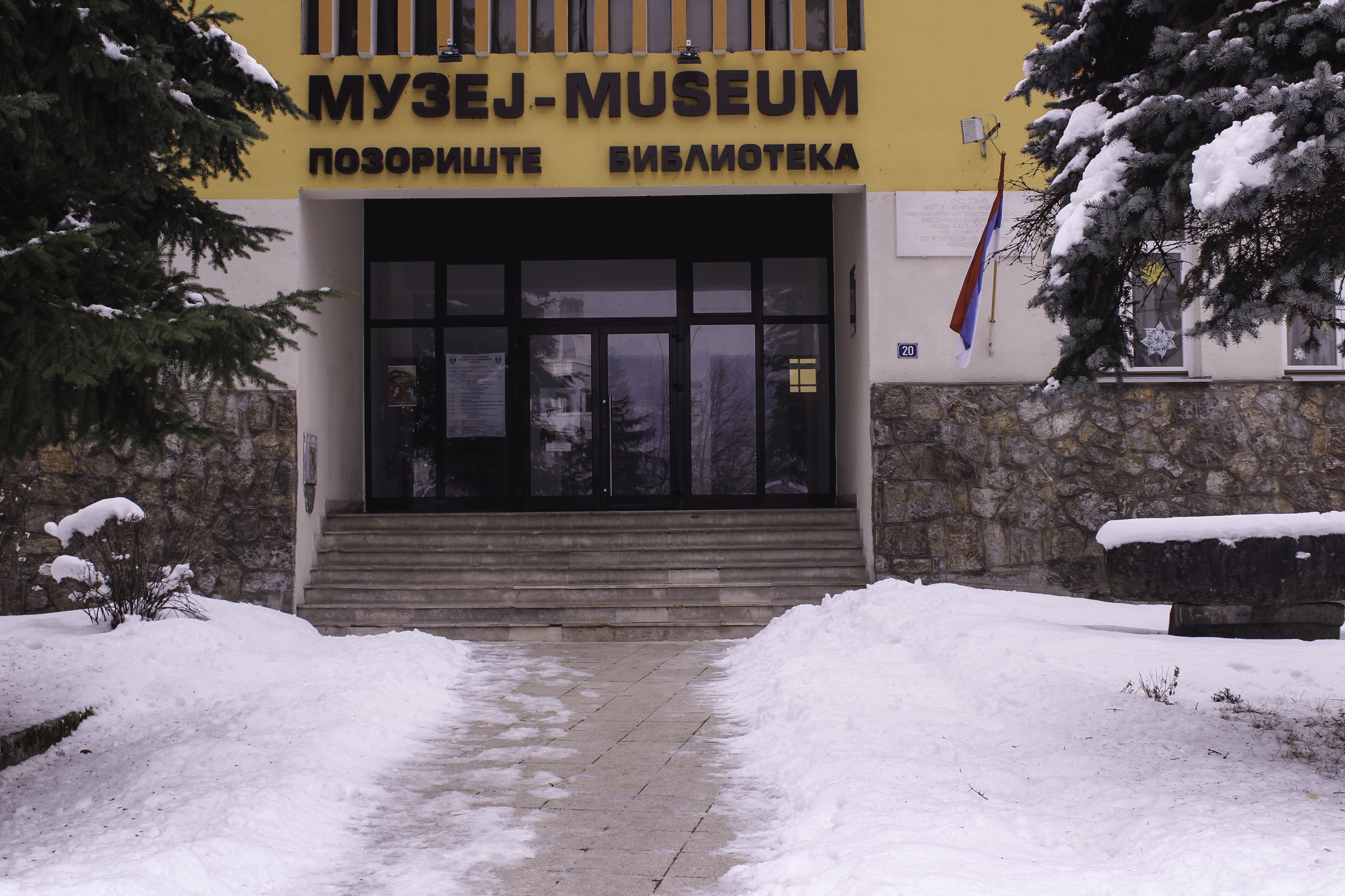 Zgrada Muzeja Stare Hercegovine Foča.